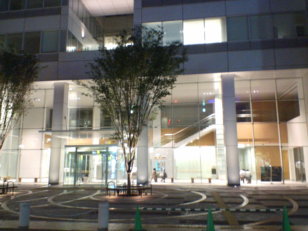 けやきプラザ正面（夜景） 撮影者: Cojilo